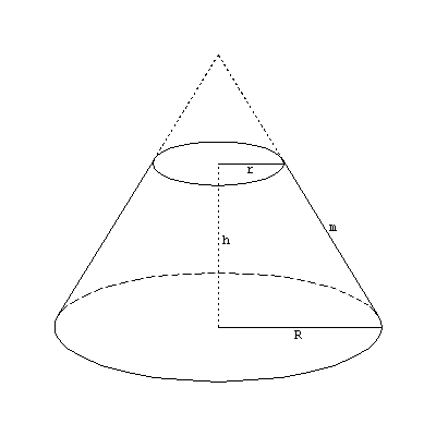 Public Domain, selbst erstellt